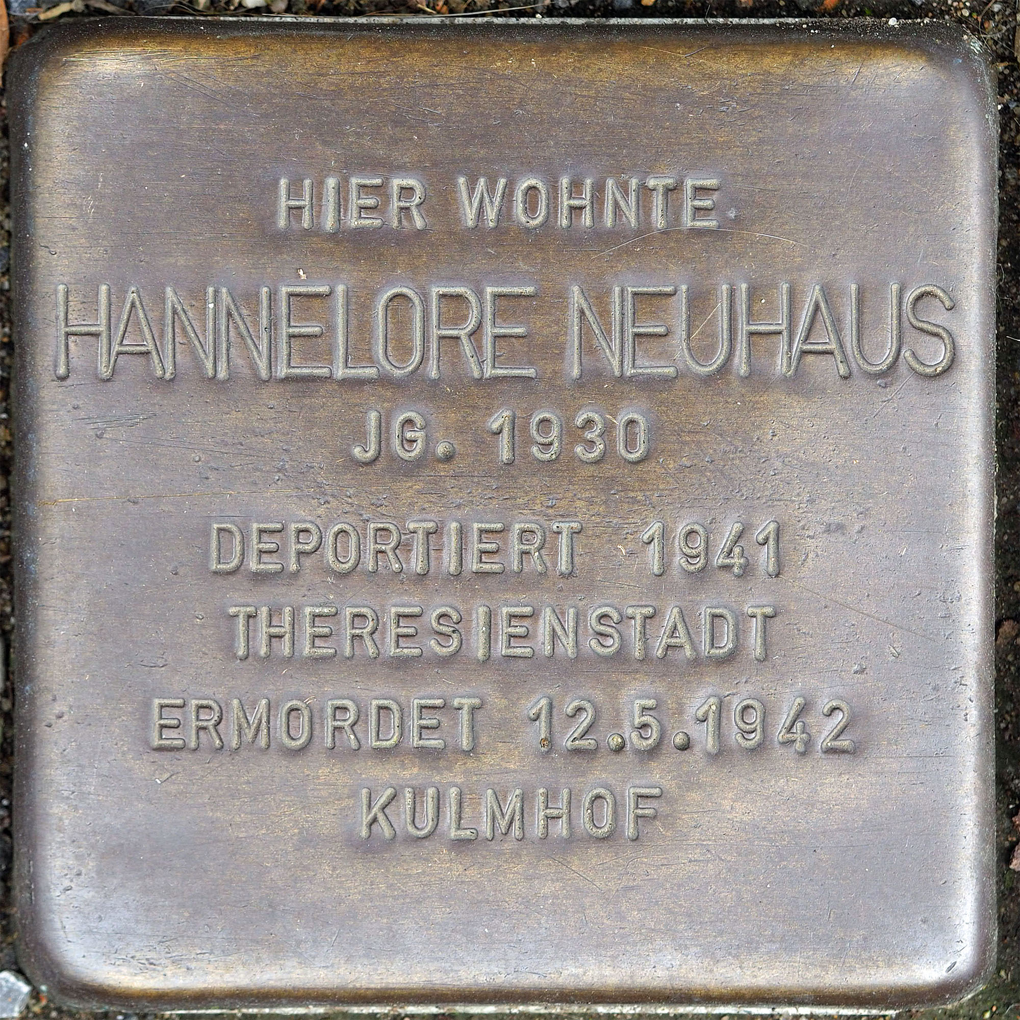 Stolpersteine Korschenbroich: Neuhaus, Hannelore